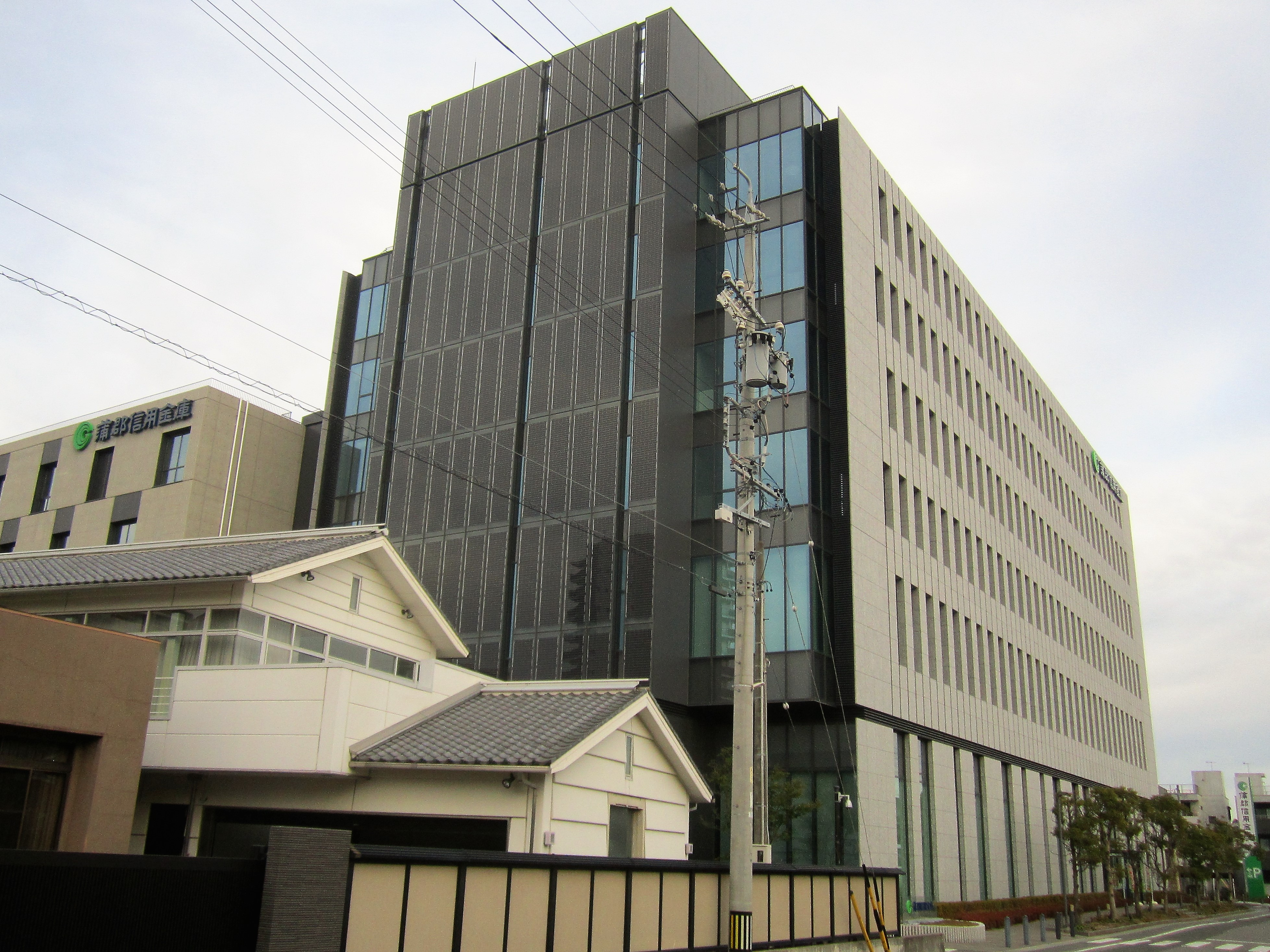 蒲郡信用金庫本店（蒲郡市神明町）